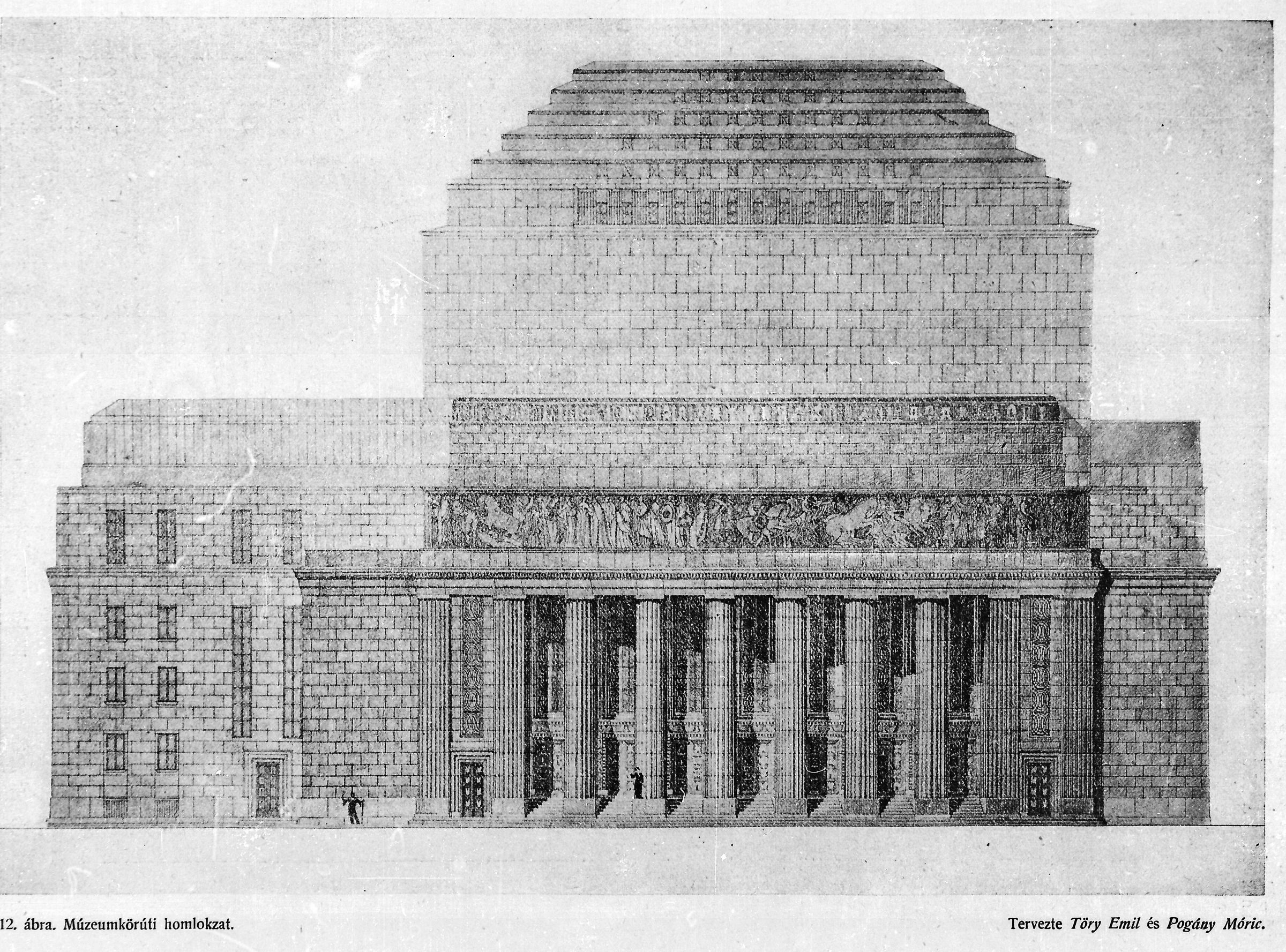 Második forduló, tervpályázat, Tőry Emil és Pogány Móric pályázatának tanulmányterve, főhomlokzat, 1913 /megj.: Építő Ipar, 1913. június 1./